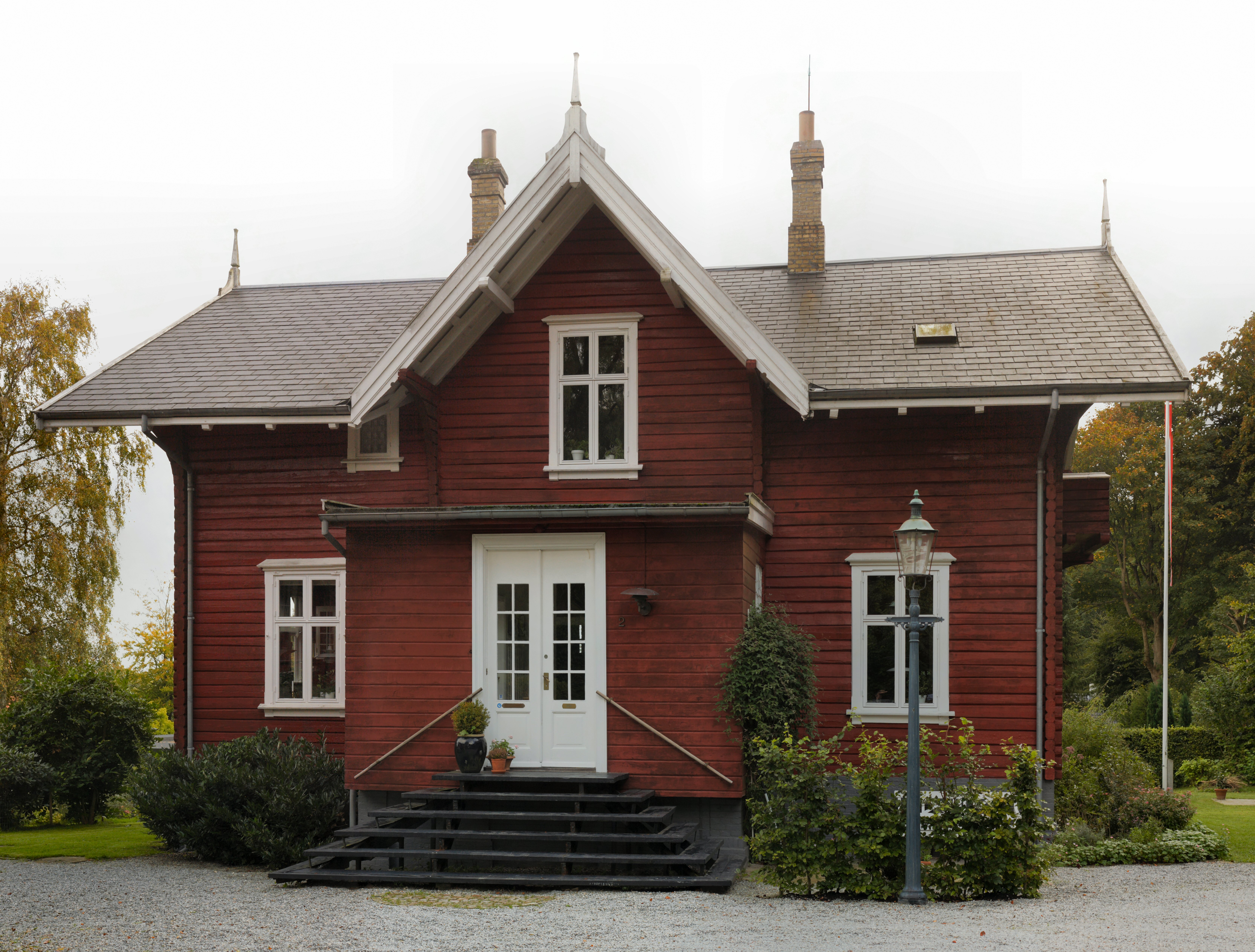 Indgangsparti af "Det norske hus" - vestfacade